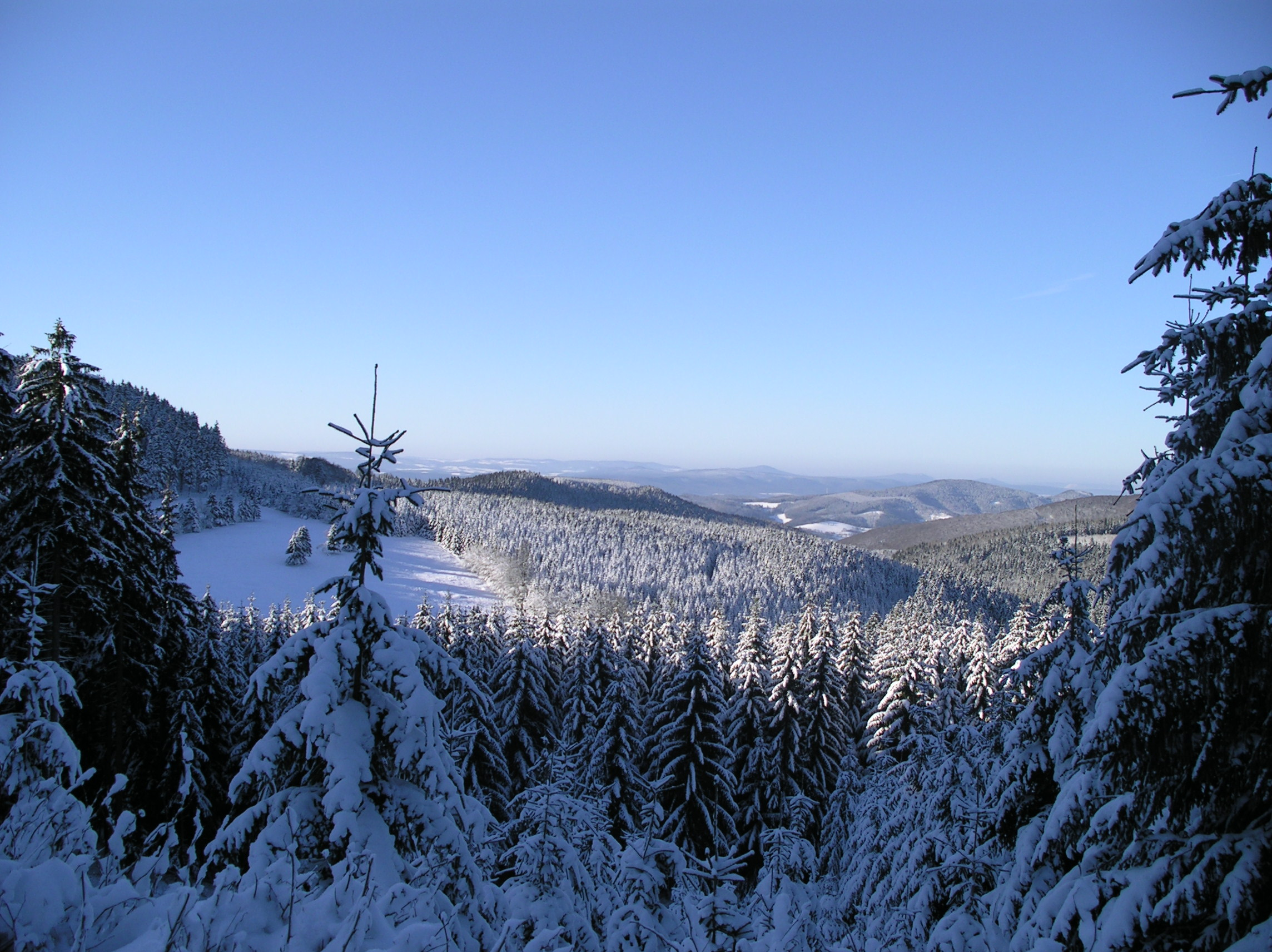 Verschneiter Winterwald oberhalb von Struth-Helmershof, Floh-Seligenthal, Thüringen, Deutschland